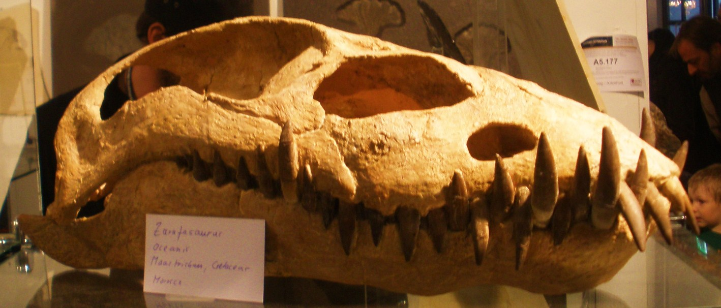 Fossil of Zarafasaura, an extinct reptile- Took the photo at Fossil Show, Munchen 2011